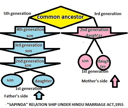 ଓଡ଼ିଆ: ହିନ୍ଦୁ ବିବାହ ଅଧିନିୟମ, ୧୯୫୫ ଅନୁଯାୟୀ "ସପିଣ୍ଡ" (Sapinda) ସମ୍ପର୍କ